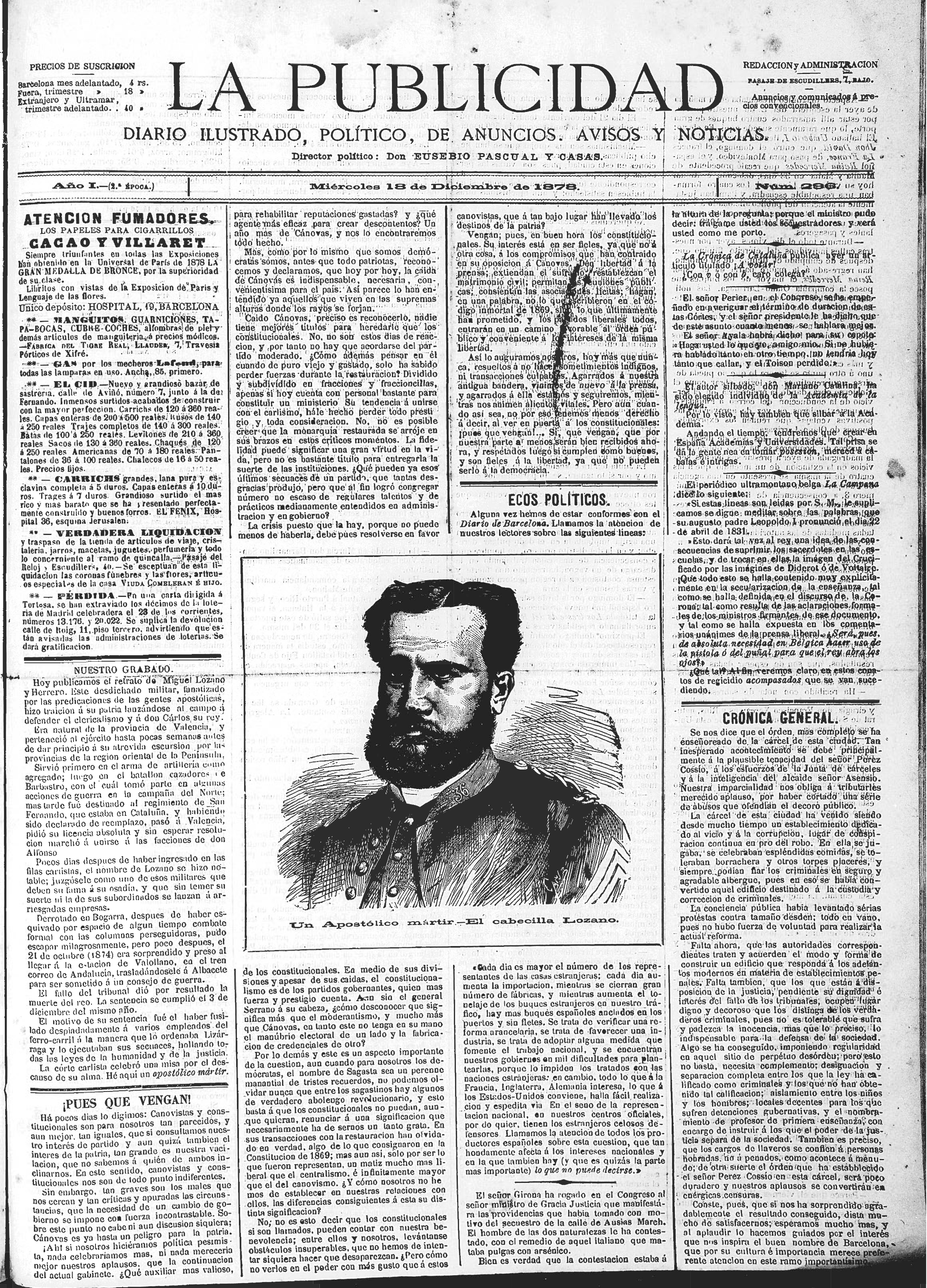 La Publicidad, 18 de diciembre de 1878.